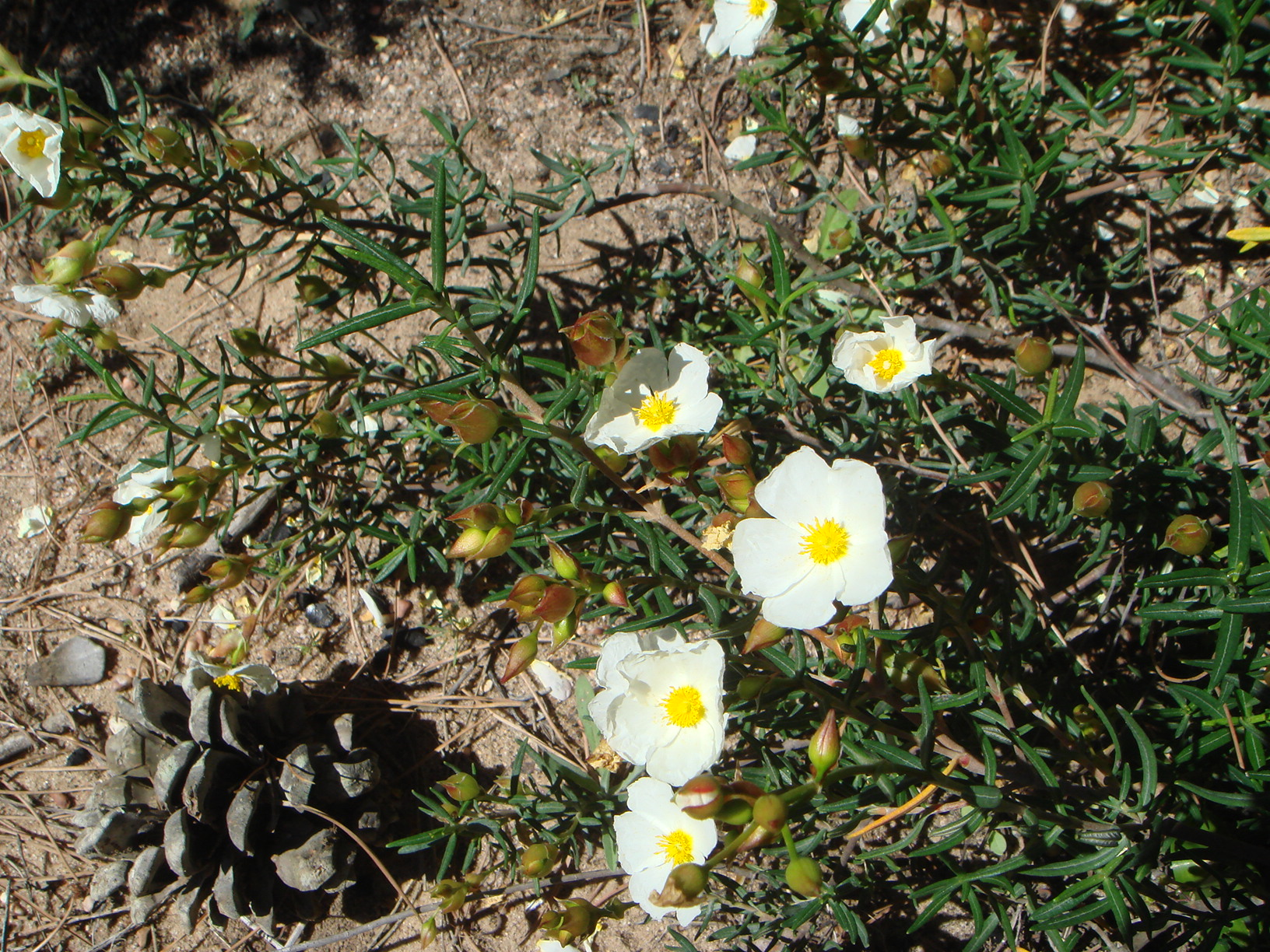 Cistus libanotis, Playa de Chiclana, Cádiz, España